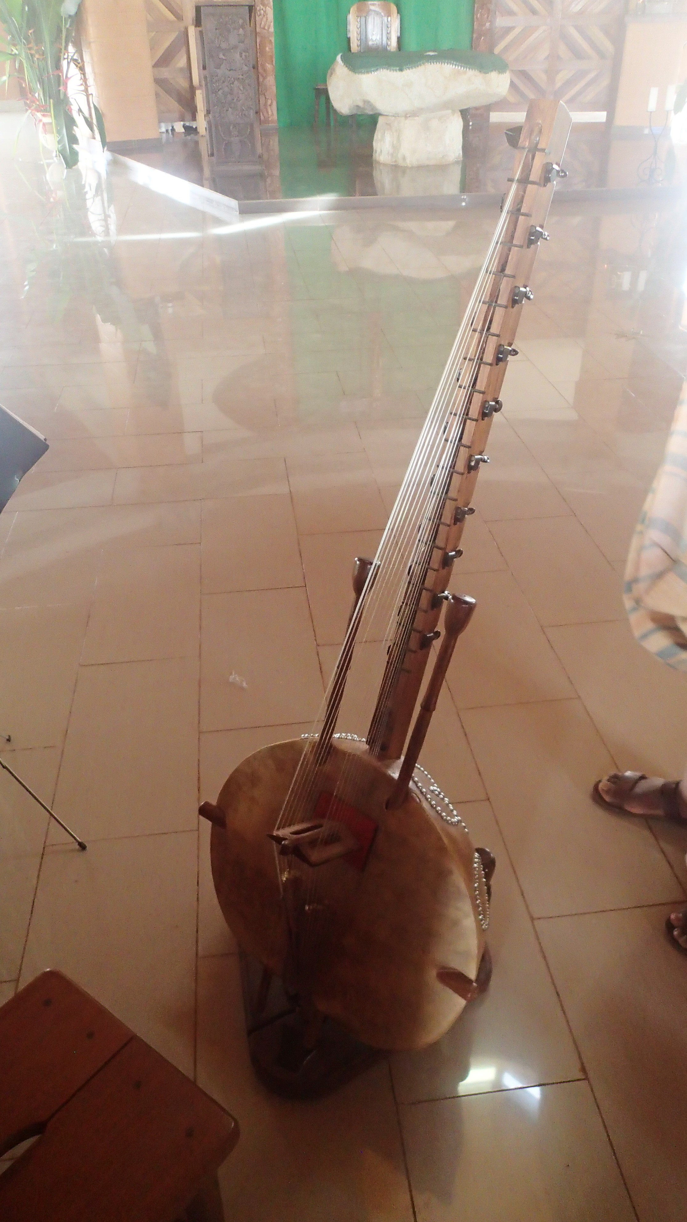 Abbaye de Koutaba - Kora pour l'usage liturgique